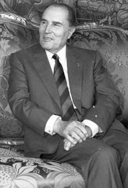 ADN-ZB Mittelstädt 8.1.1988 Frankreich: Honecker-Besuch Der Präsident der Französischen Republik, Francois Mitterand, empfing den zu einem Staatsbesuch in Paris weilenden Generalsekretär des ZK der SED und Vorsitzenden des Staatsrates der DDR, Erich Honecker, im Elysée-Palast zum Abschlußgespräch.